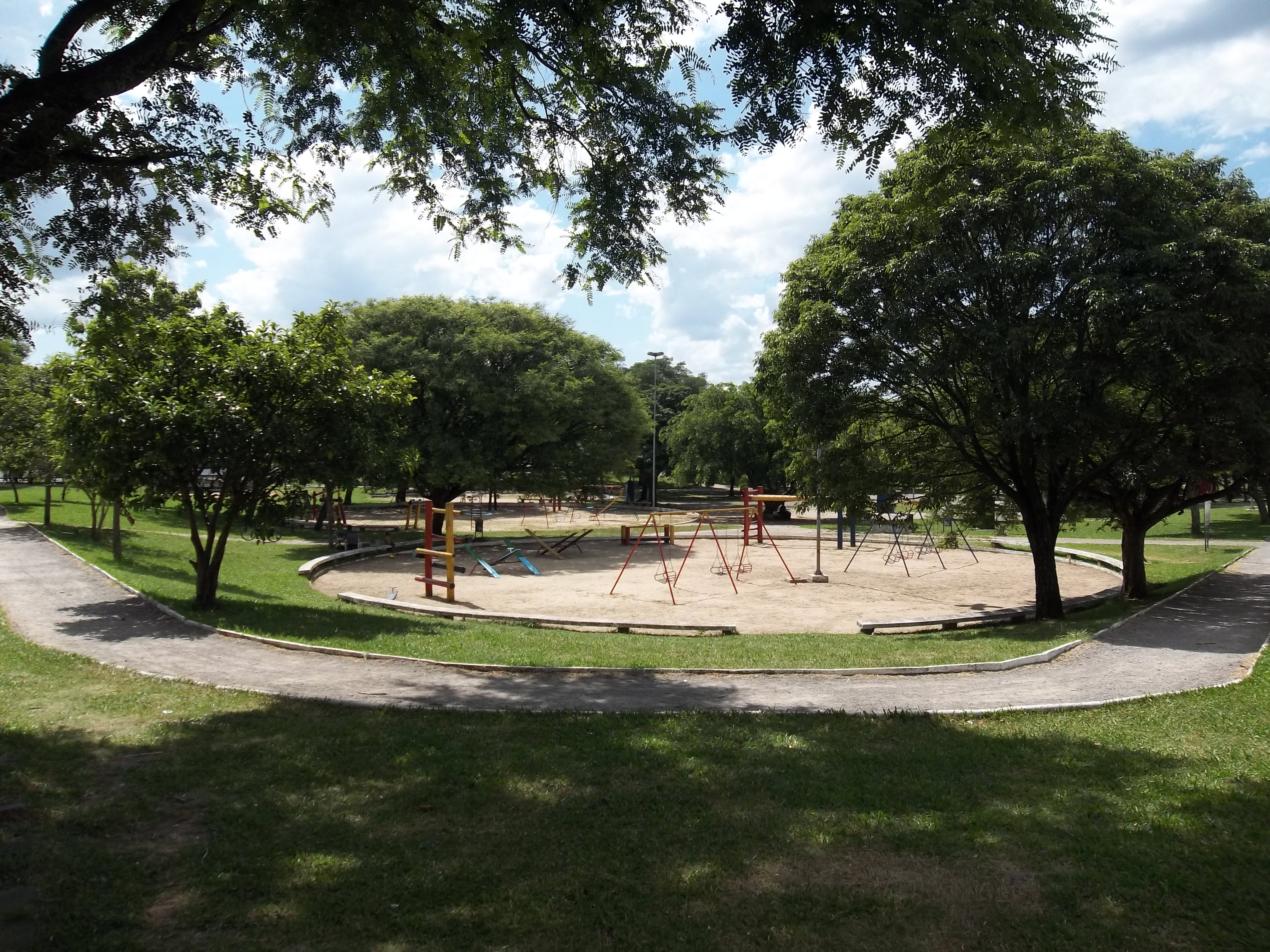 Praça General Osório. Passo d'Areia, Sede, Santa Maria, Rio Grande do Sul, Brasil